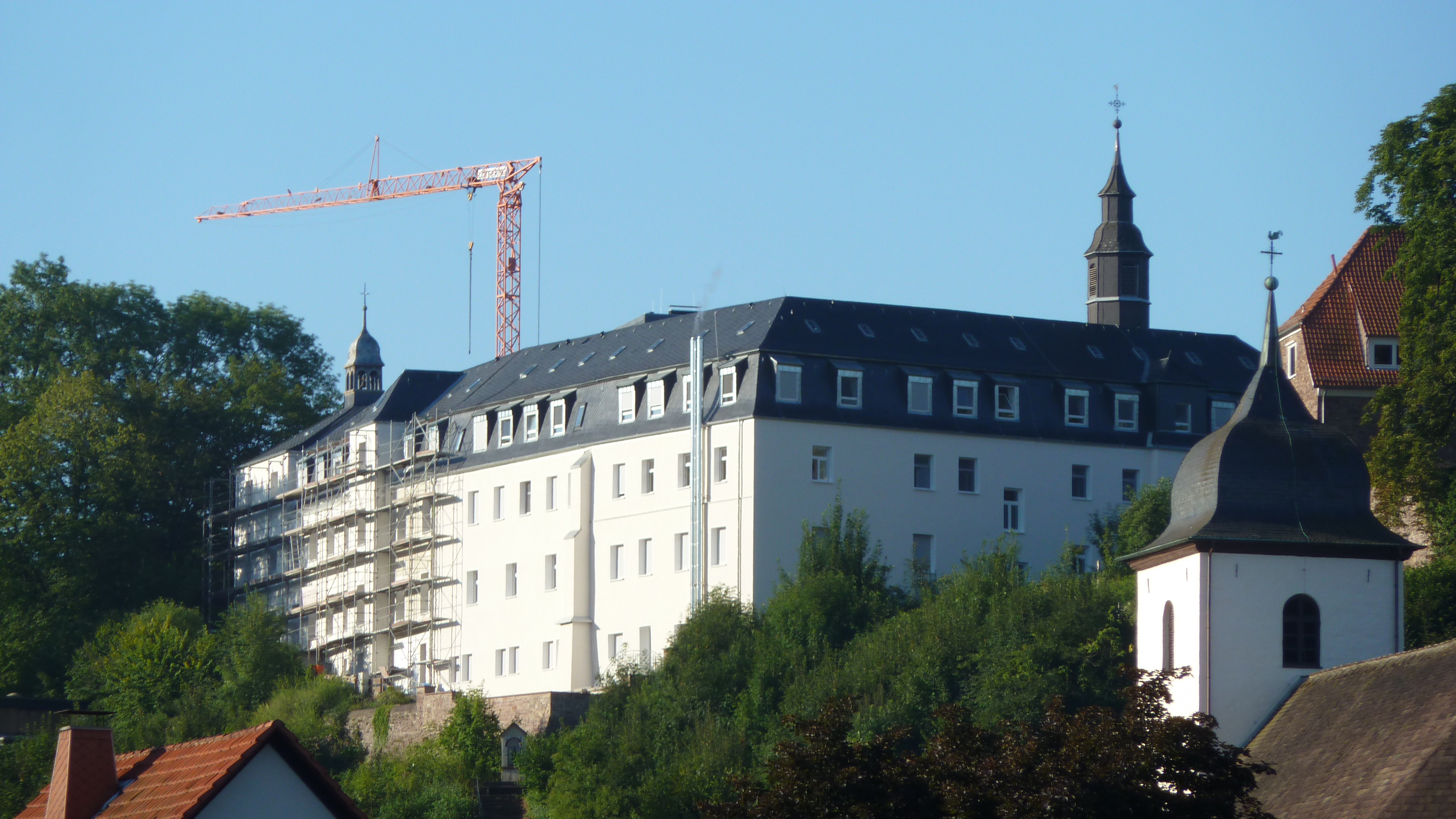 Blick vom gegenüberliegenden Weserufer auf die Benediktinerinnen-Abtei vom Heiligen Kreuz in Herstelle, Nordrhein-Westfalen. Im Vordergrund rechts der Turm der Dorfkirche